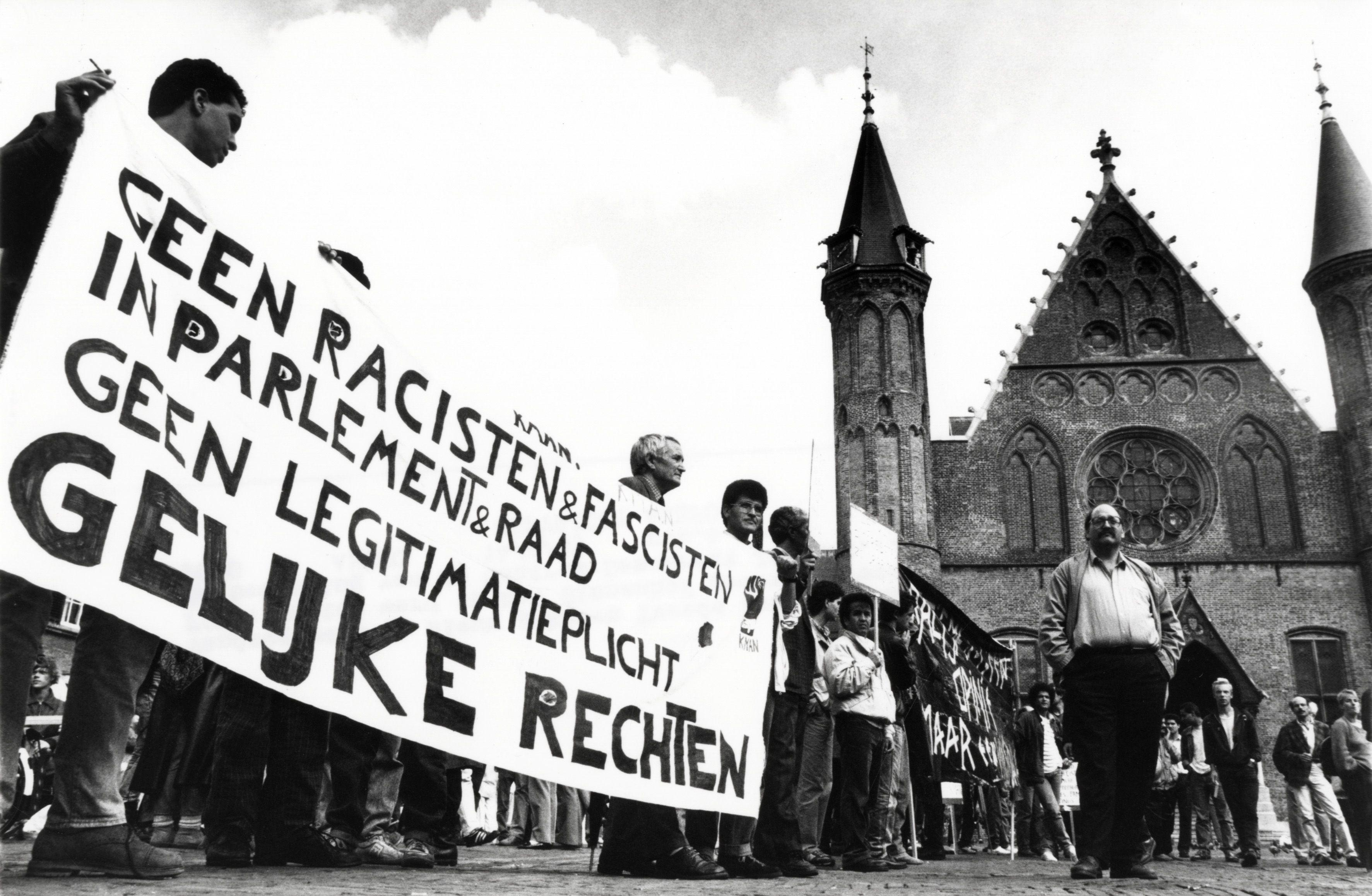 Tijdens de beëdiging van de nieuw gekozen Tweede Kamer wordt buiten op het binnenhof gedemonstreerd tegen de installatie van de centrumdemocraat Hans Janmaat. Nederland, Den Haag, 14 september 1989.